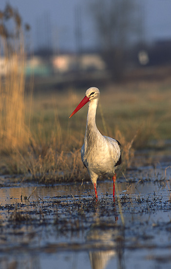 Ciconia ciconia